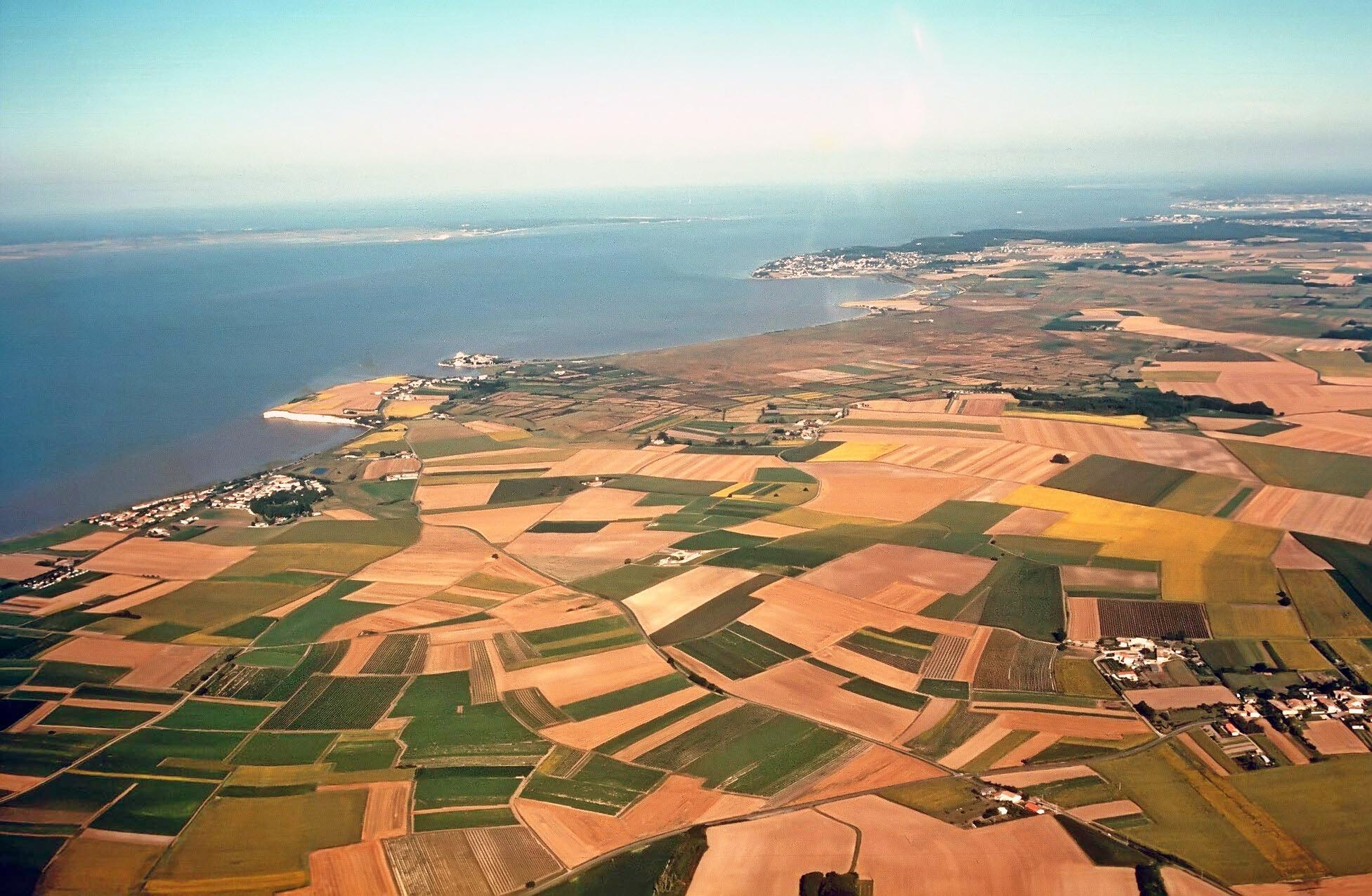 Découverte en 1975, par Jacques DASSIÉ, prospecteur aérien, la ville portuaire gallo-romaine de NOVIOREGUM est localisée sur la commune de Barzan, en Charente Maritime. Entourée d'un cercle de collines, elle se situe rive droite de la Gironde, près de Talmont-sur-Gironde. De grandes fouilles, initialisées par les Facultés de Bordeaux, La Rochelle, Poitiers, avec le concours de l'ASSA Barzan, de la DRAC Poitou-Charentes ont porté sur le temple du Fâ et son péribole, la Grande Avenue, les Thermes, les horrea et le Théâtre.